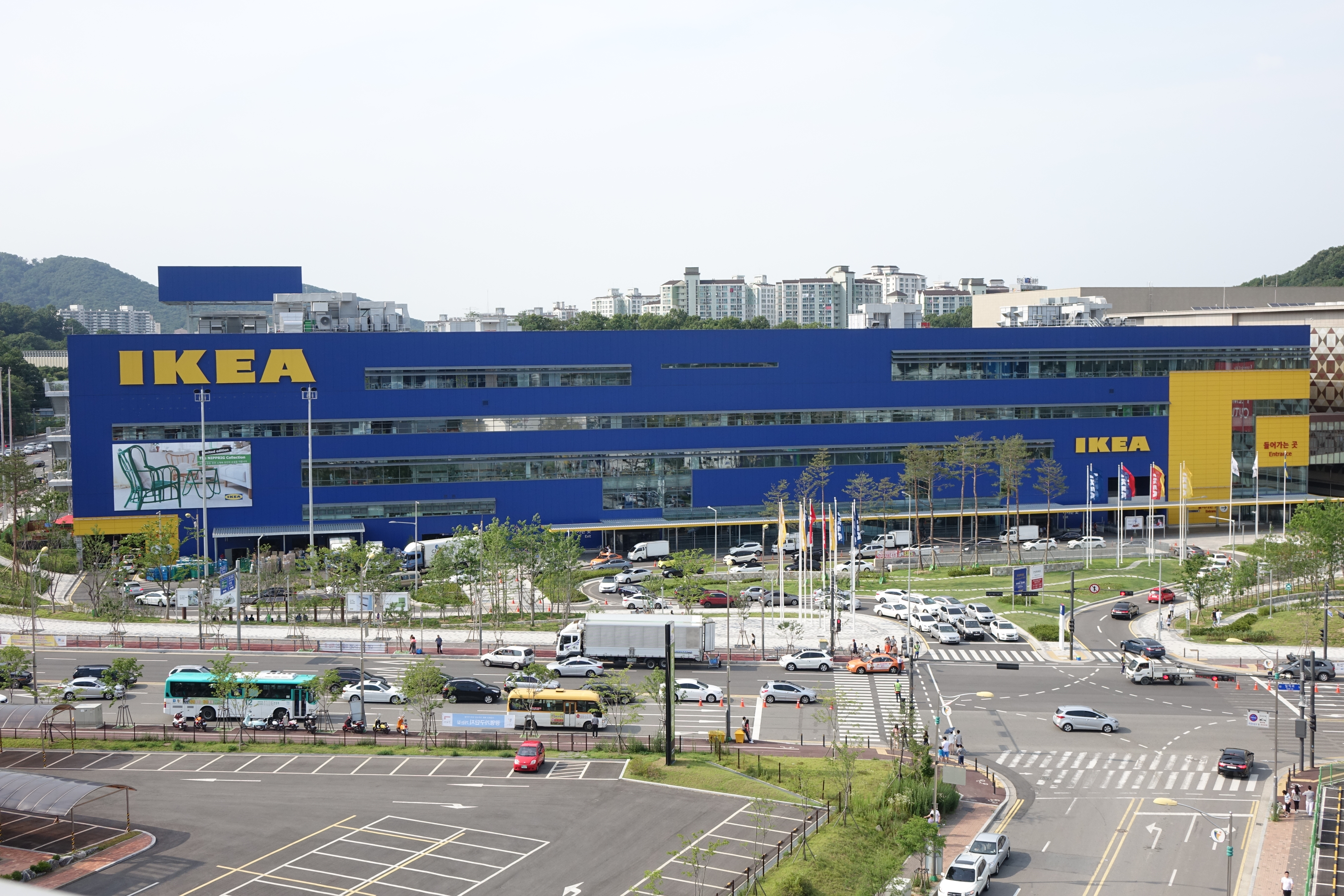 본인은 사진의 저작권자로서, 이 저작물을 'CC0 1.0 보편적 퍼블릭 도메인 기증' 저작권으로 배포합니다. 이에 따라, 본인은 법이 정한 범위 내에서 저작인접권을 포함해 저작권법에 따라 전세계적으로 해당 저작물에 대해 본인이 갖는 일체의 권리를 포기하였어요. 본인의 허락을 구하지 않아도 누구나 이 저작물을 상업적인 목적을 포함 모든 목적으로 복사, 수정, 배포, 실연하실 수 있어요. 단 사진에 사람이 있는 경우 사용 전에 해당 인물의 동의가 필요하며 이는 초상권 및 퍼블리시티권을 사진 속 인물이 보유하고 있기 때문입니다. 전문적인 편집을 위해 사용되는 원본 파일을 원하시는 분은 원본을 원하시는 파일의 이름을 보내주세요. 감사합니다. 2015년 7월 25일. 최광모.